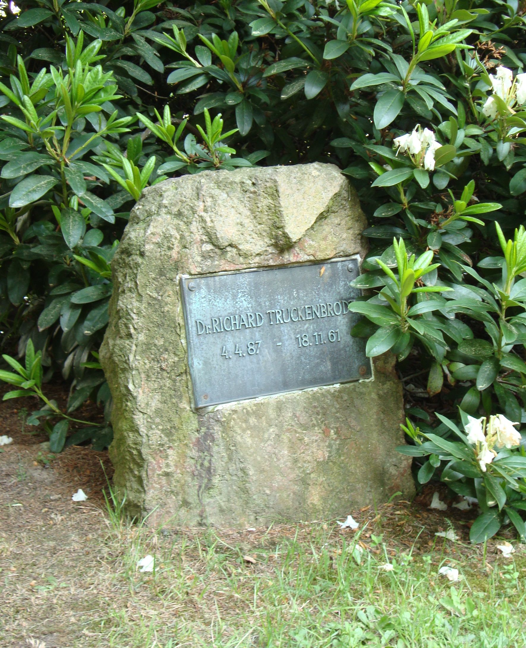 Gedenkstein für Richard Truckenbrodt vor dem Bertolt-Brecht-Gymnasium in Schwarzenberg/Erzgeb.